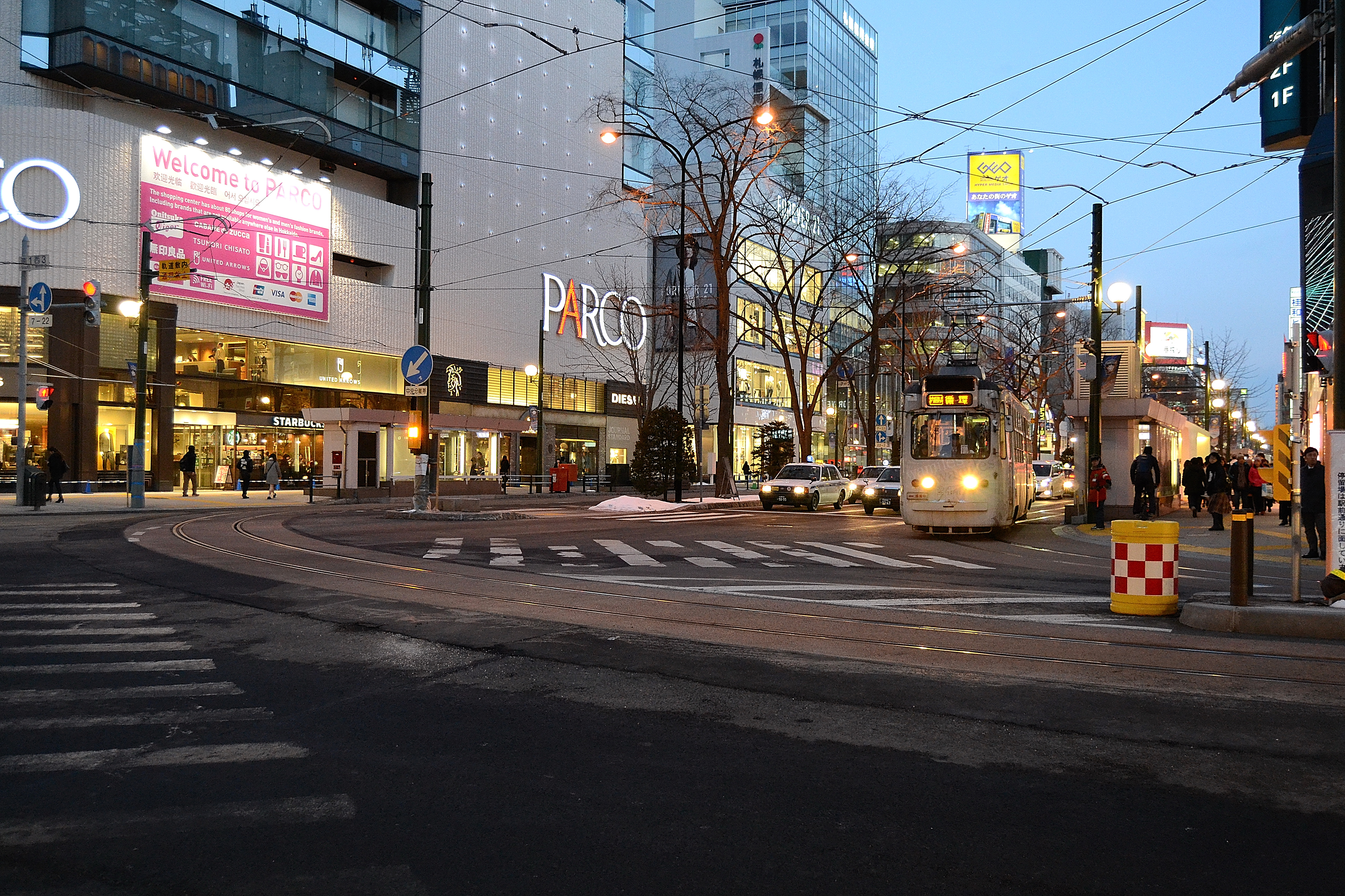 札幌市電の西4丁目 - すすきの間の延伸により札幌の駅前通りに新たに敷設された路線。ダブル(デュアル)サイドリザベーション方式による敷設となっている